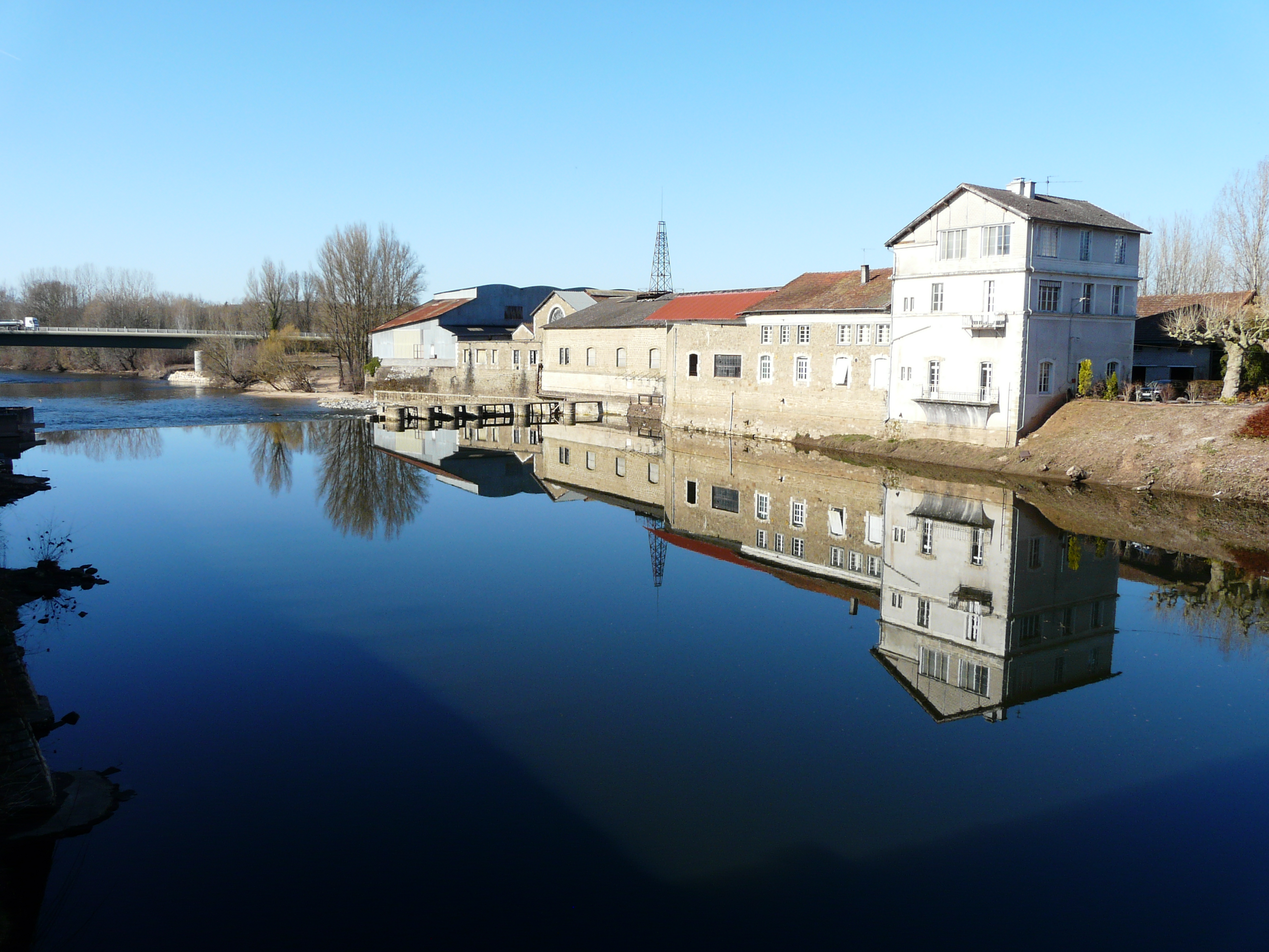 En aval du pont de la route départementale 19, la Vézère marque la limite entre Larche (à gauche) et Saint-Pantaléon-de-Larche (en rive opposée), Corrèze, France.